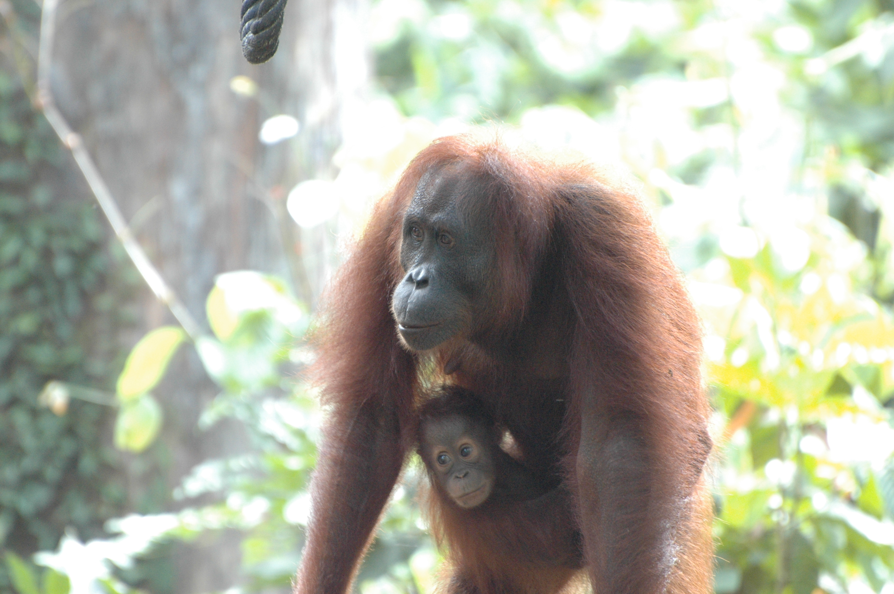 Bornean Orangutan (Pongo_pygmaeus)